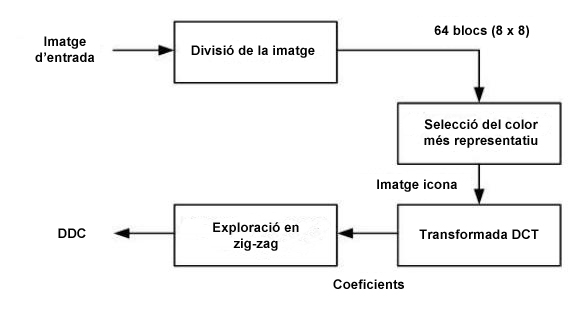 Esquema que descriu el procés d'extracció per obtenir el DDC (Descriptor de la Distribució del Color) d'una imatge. Descriptor visual de l'estàndard MPEG-7.